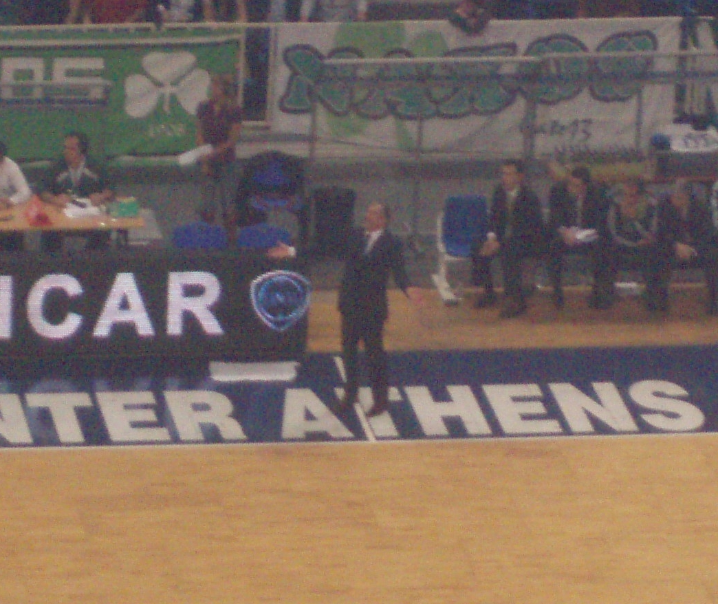 Željko Obradović. PAO-EFES